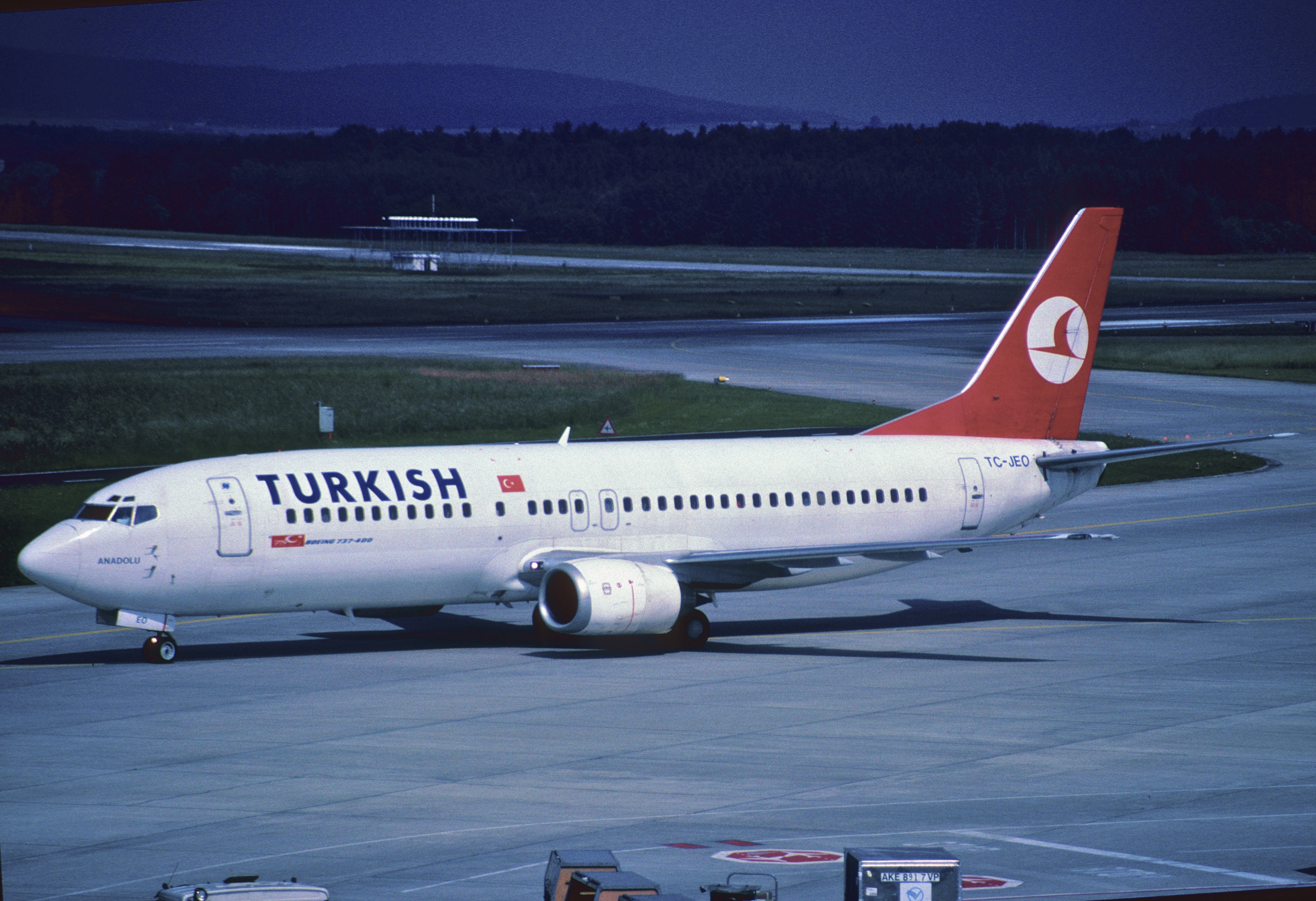 60bg - Turkish Airlines Boeing 737-4Q8; TC-JEO@ZRH;17.06.1999